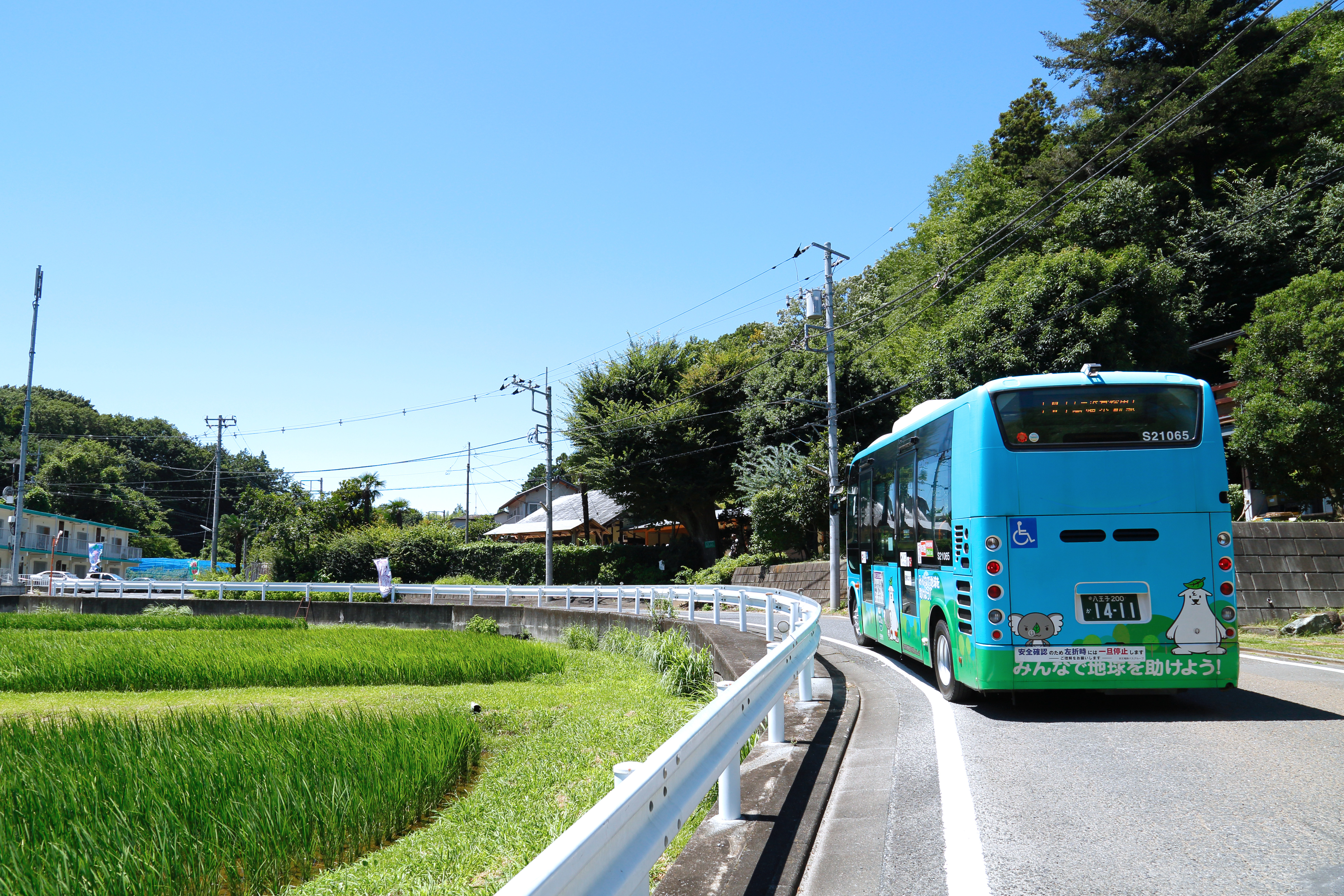 日野市百草の倉沢地区。 日野市ミニバス三沢台路線（W）系統のミニバスも走る。